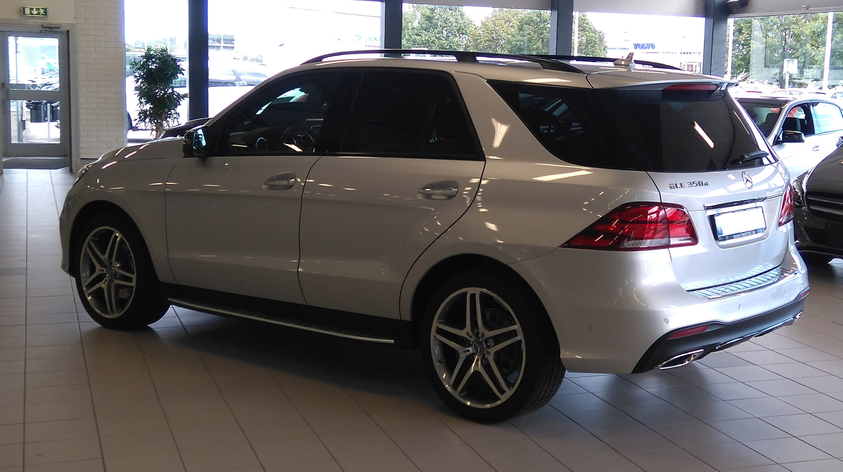 2015 Mercedes-Benz GLE 350d